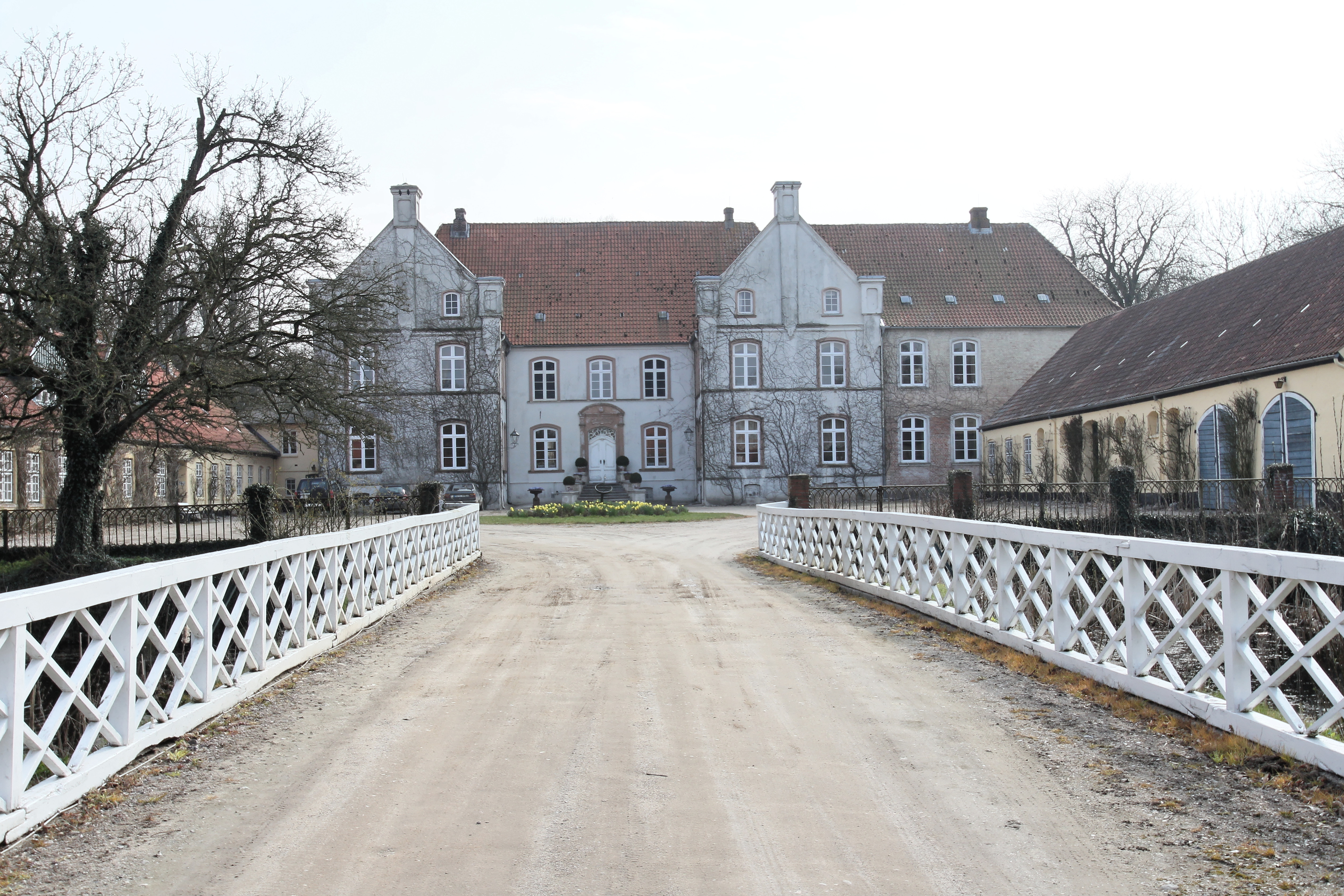 Gut Damp, Herrenhaus